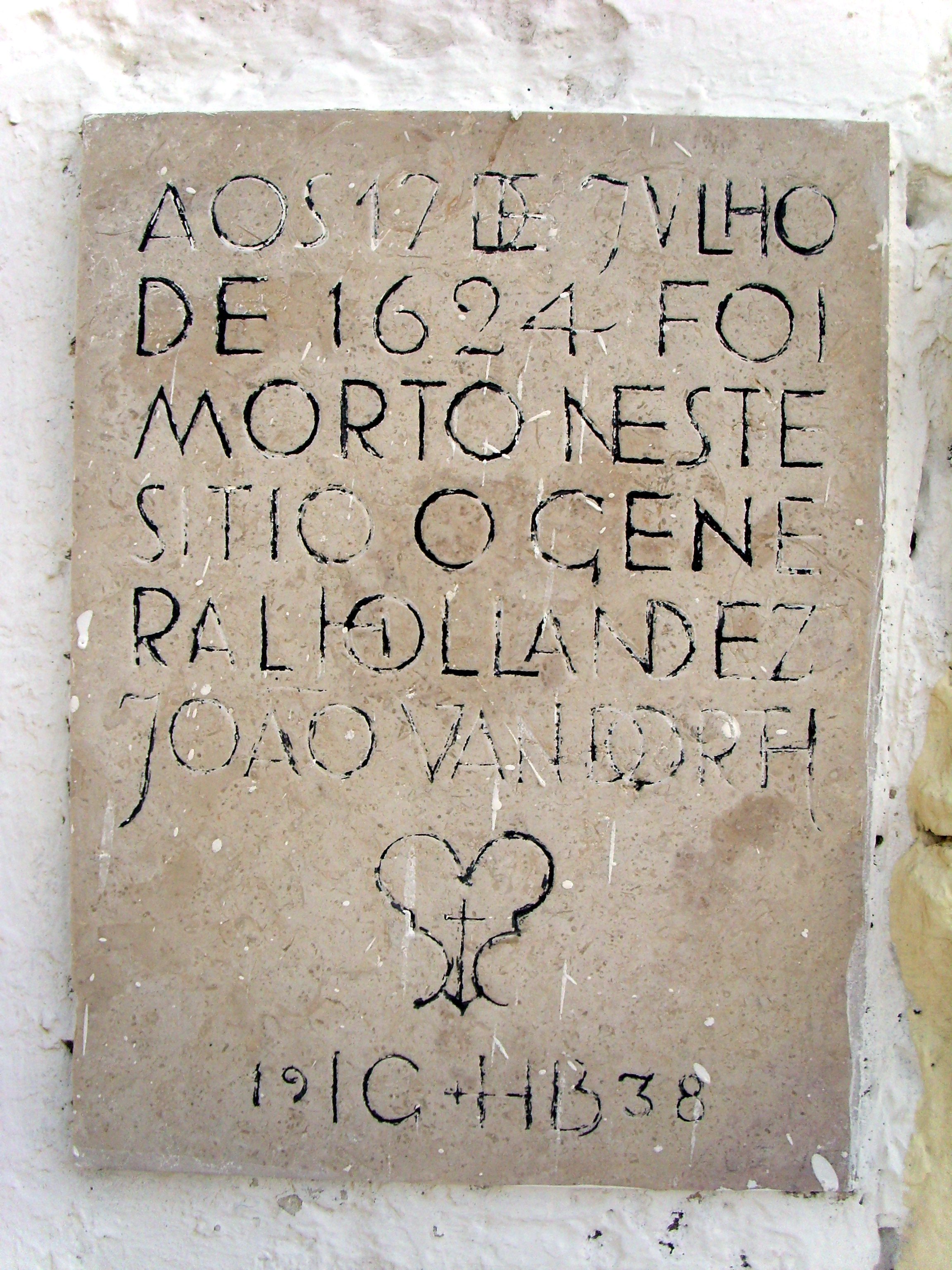 Placa comemorativa fixada no lado esquerdo do portão de entrada do Forte de Monte Serrat - Salvador/BA